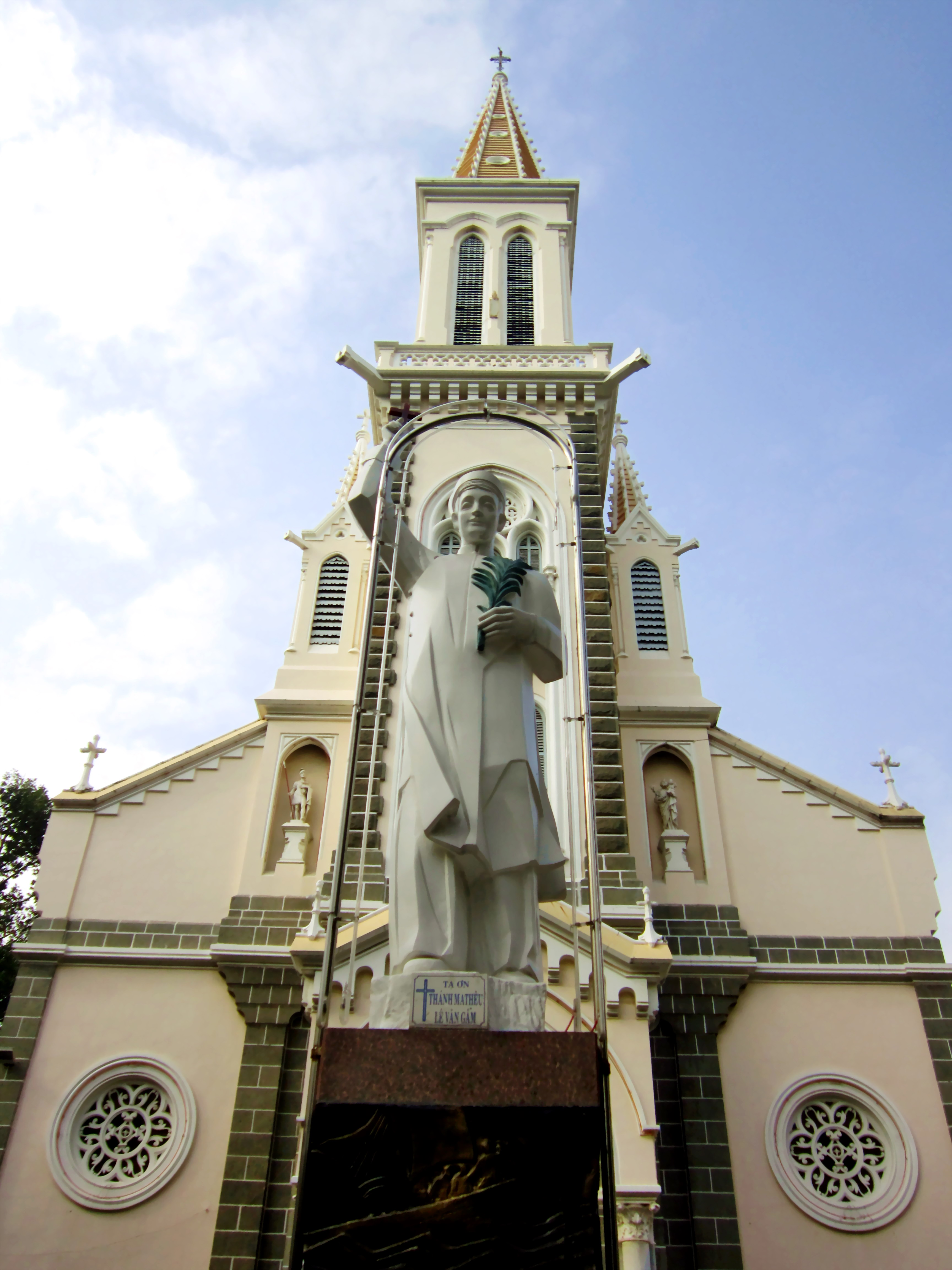 Tượng đài thánh tử đạo Việt Nam là Mátthêu Lê Văn Gẫm ở phía trước nhà thờ Huyện Sĩ, quận 1, Thành phố Hồ Chí Minh, Việt Nam.